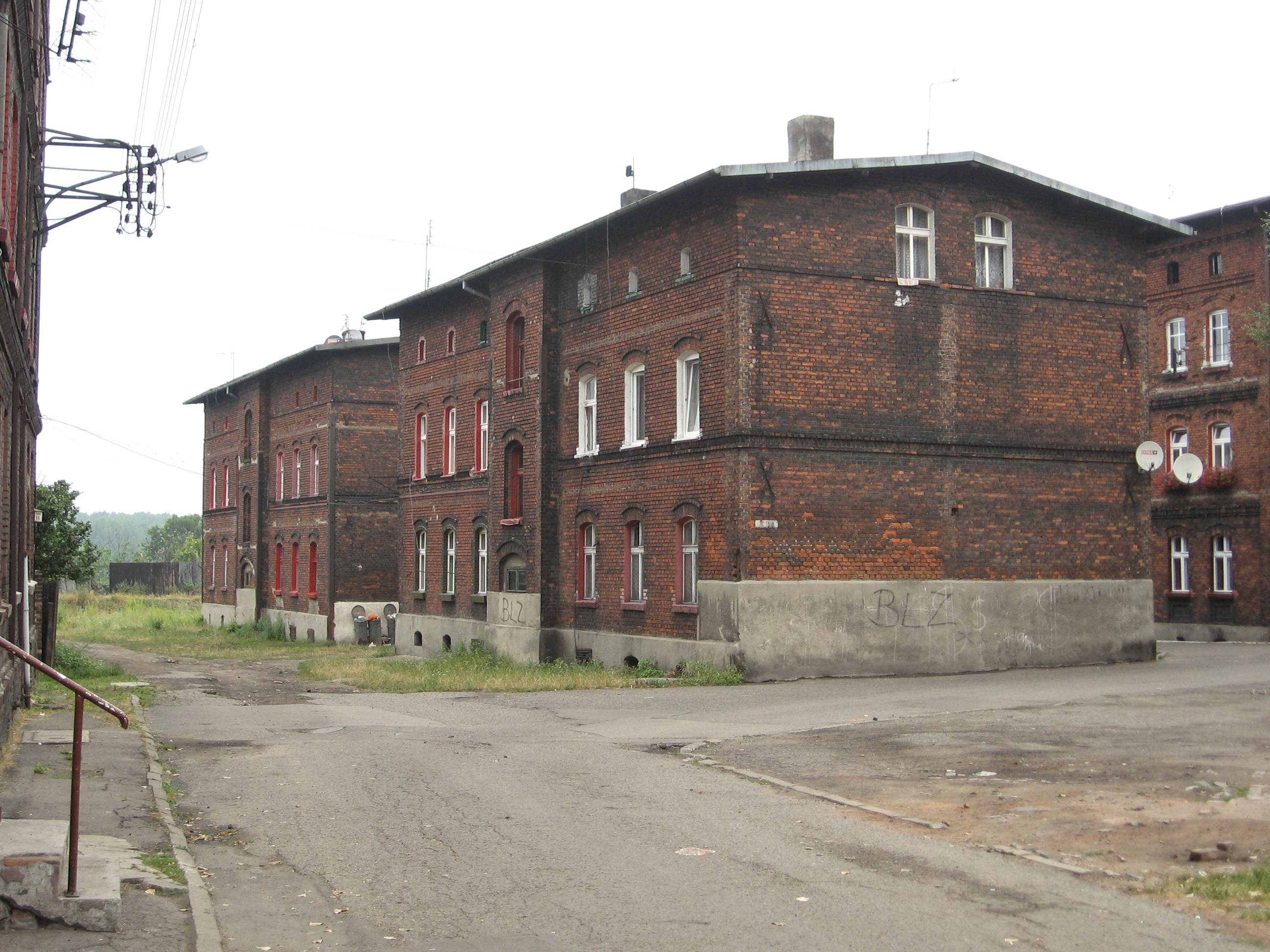 Świętochłowice, Lipiny, stara zabudowa